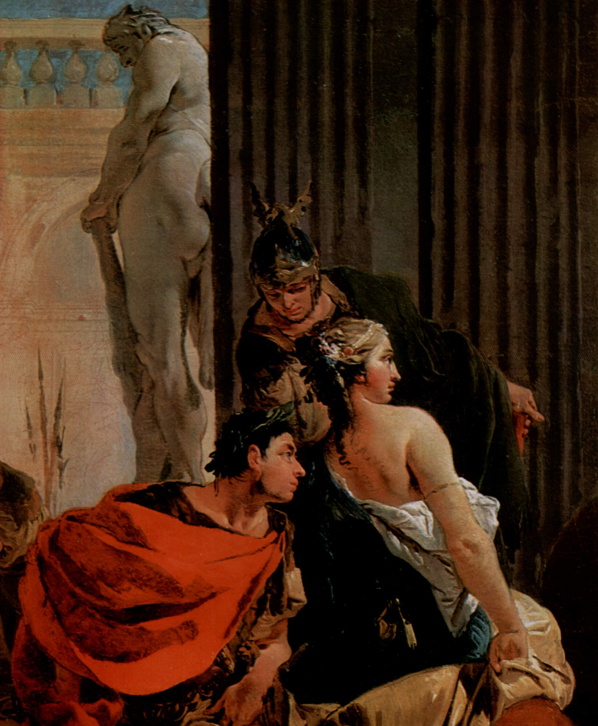 detail